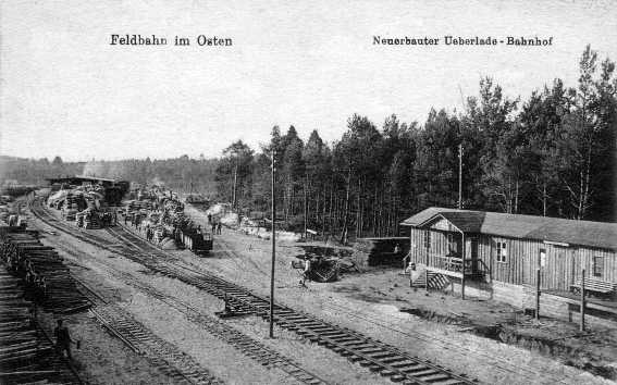 Feldbahn im Osten; Neugebauter Ueberlade-Bahnhof (Feldbahn Bełżec–Trawniki)